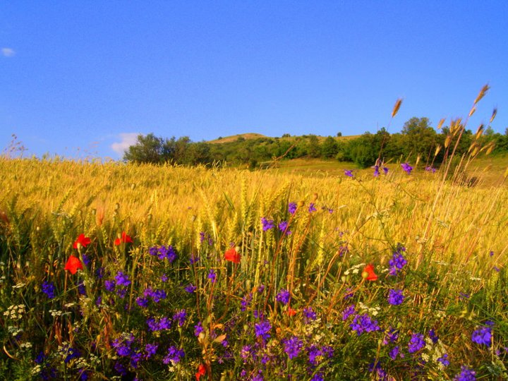 Pamje fshati, Shashkofc-Prishtinë